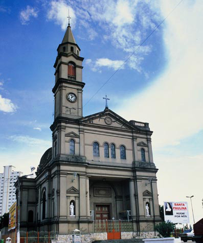 Vista frontal da Igreja Matriz de Nossa Senhora do Ó. Inaugurada em Janeiro de 1901, é o marco central do Bairro Freguesia do Ó, em São Paulo.